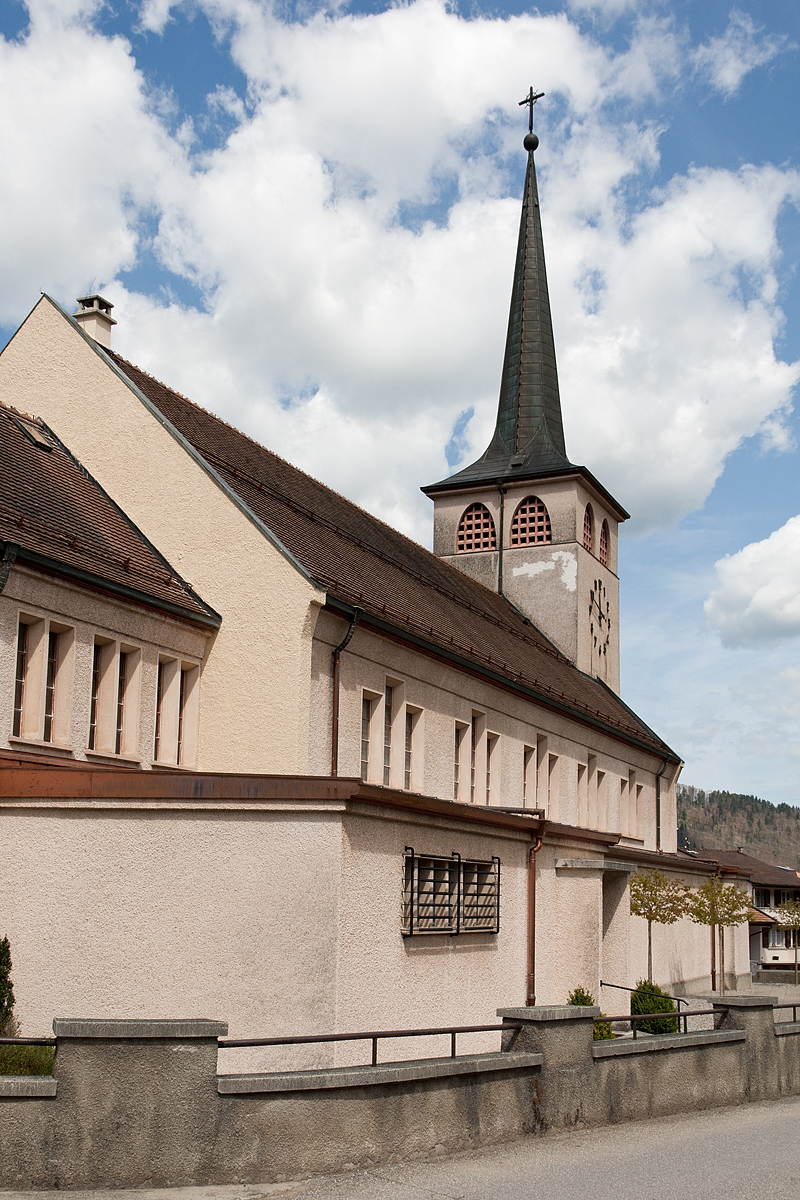 Eglise Saint-Jacques et Saint-Barthélemy à Grandvillard (FR)